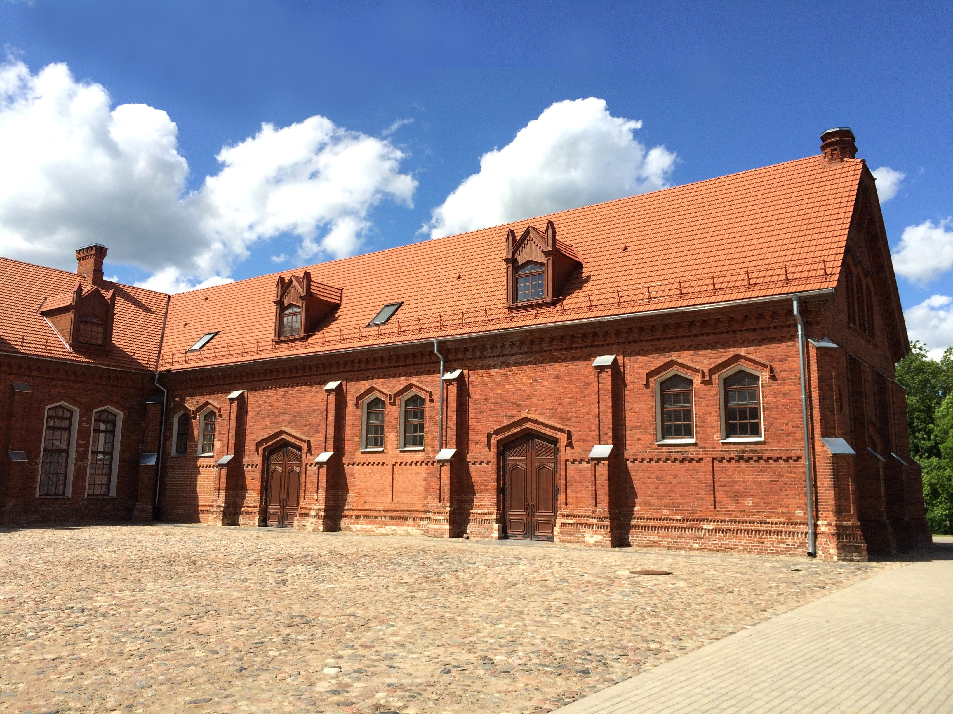 Raudondvario dvaro sodybos žirgynas